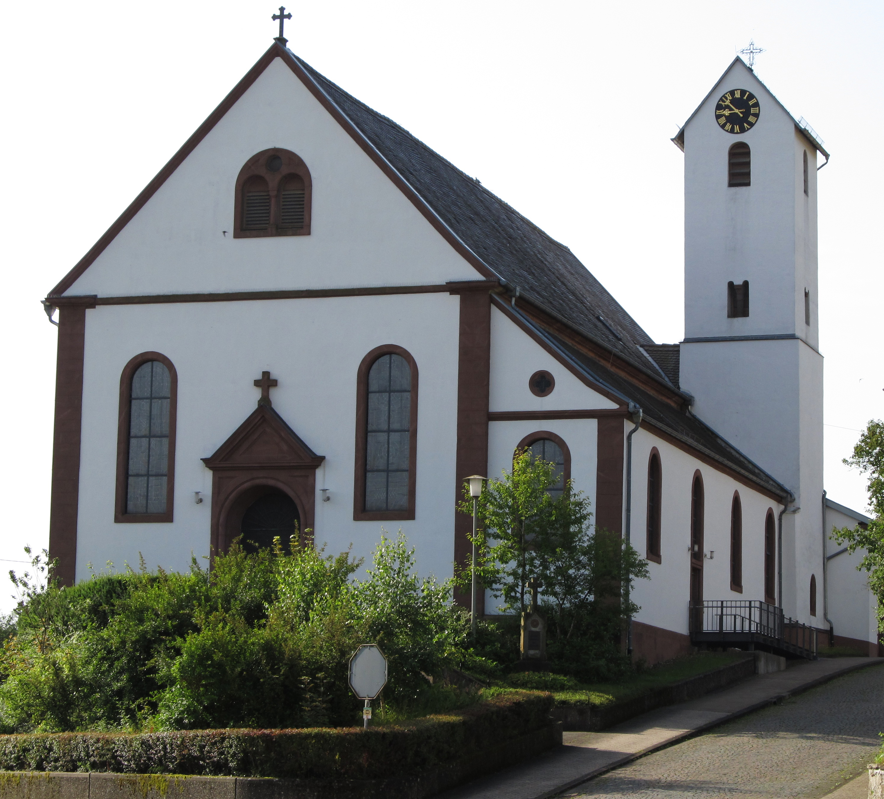 Die katholische Pfarrkirche St. Mauritius in Rubenheim, einem Ortsteil der Gemeinde Gersheim, Saarland